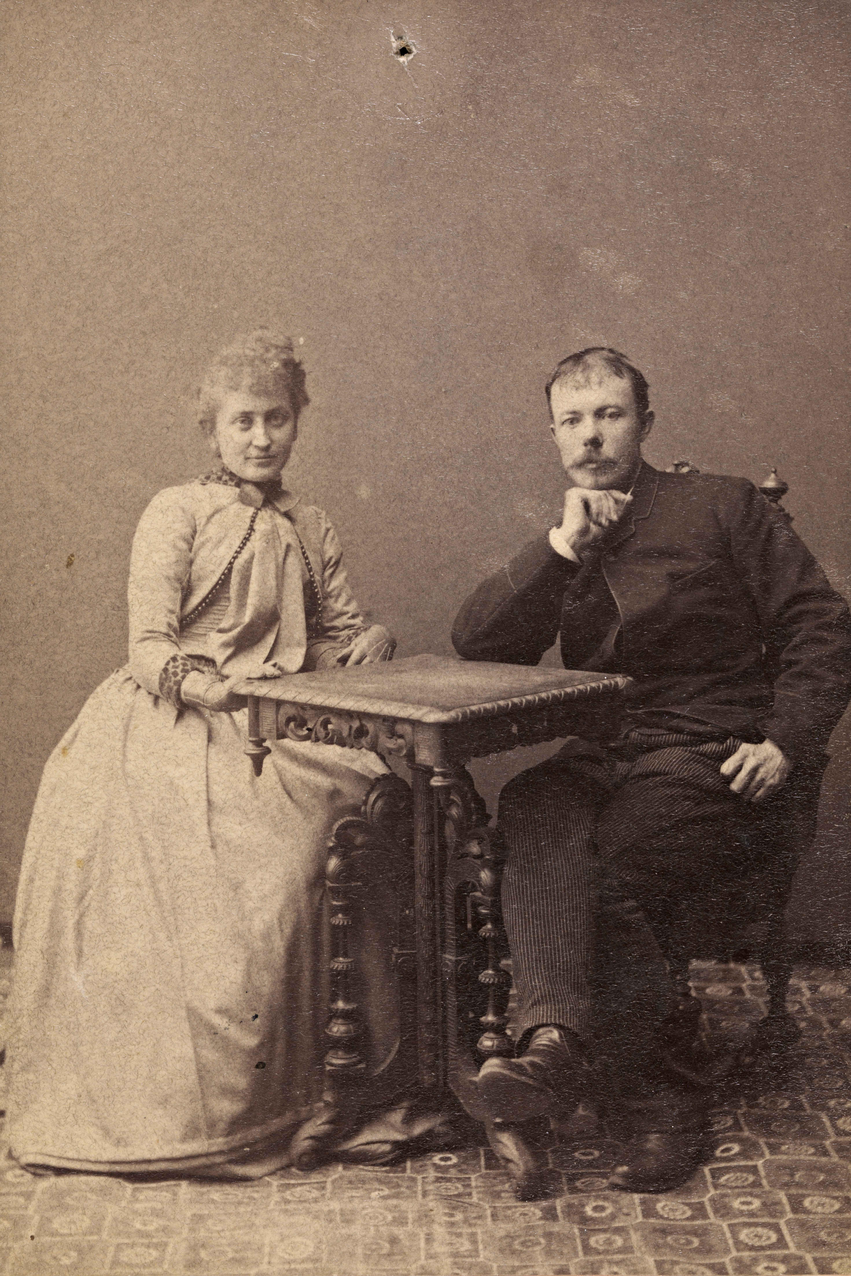 Tittel / Title: Portrett av Arne og Hulda Garborg, ca. 1890 Motiv / Motif: Visittkort Bildesignatur / Image Number: blds_03754